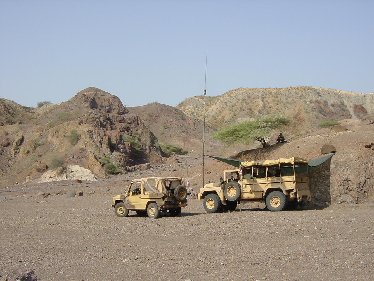 Station radio de la 13e DBLE au CECAP à Djibouti